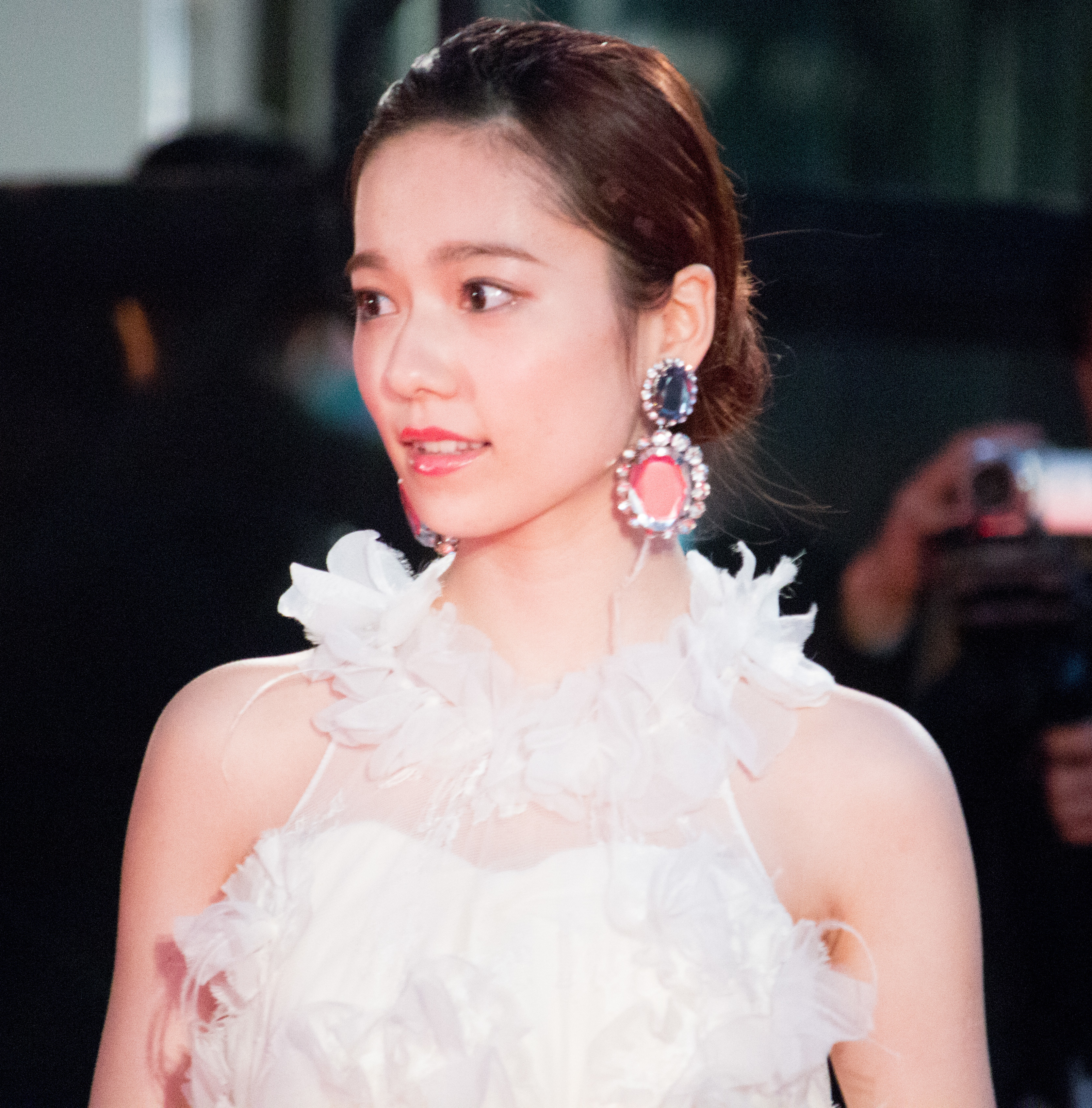 第28回 東京国際映画祭 オープニングセレモニー 島崎遥香 (劇場霊)